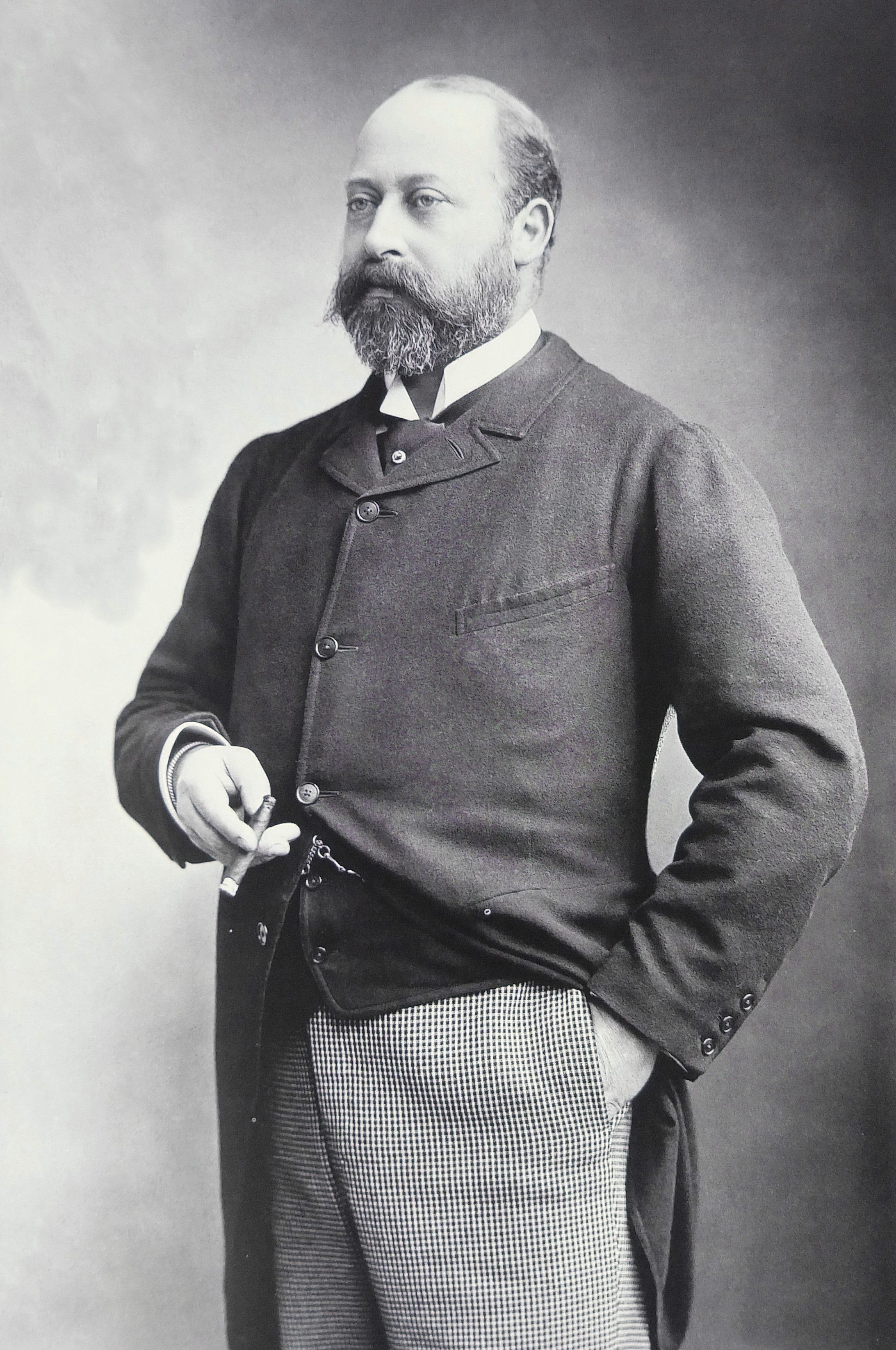 Edouard VII, prince de Galles, photographié en 1894 par Paul Nadar.